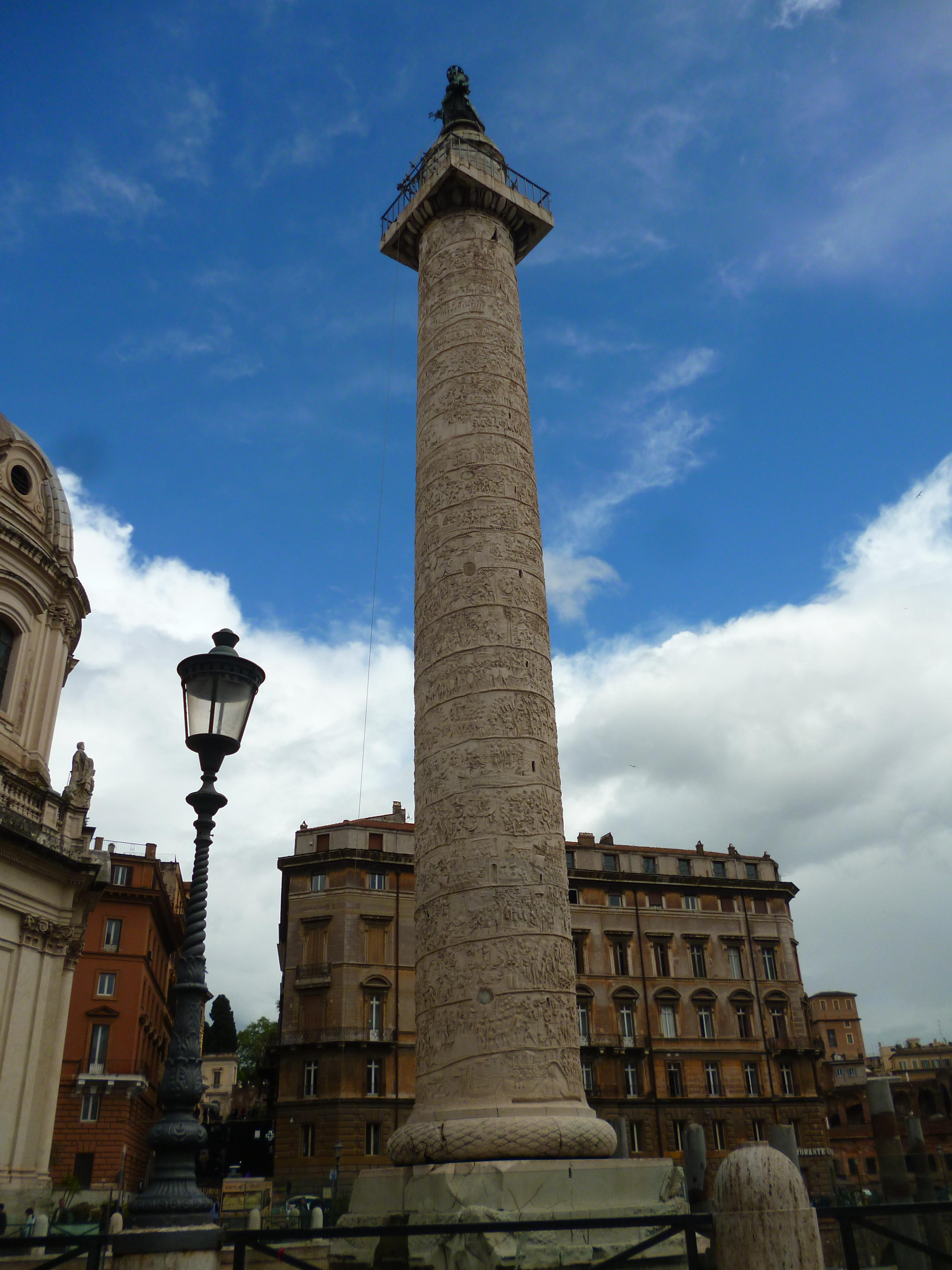 Cette photo a été prise après que nous ayons visité le musée du Capitole.